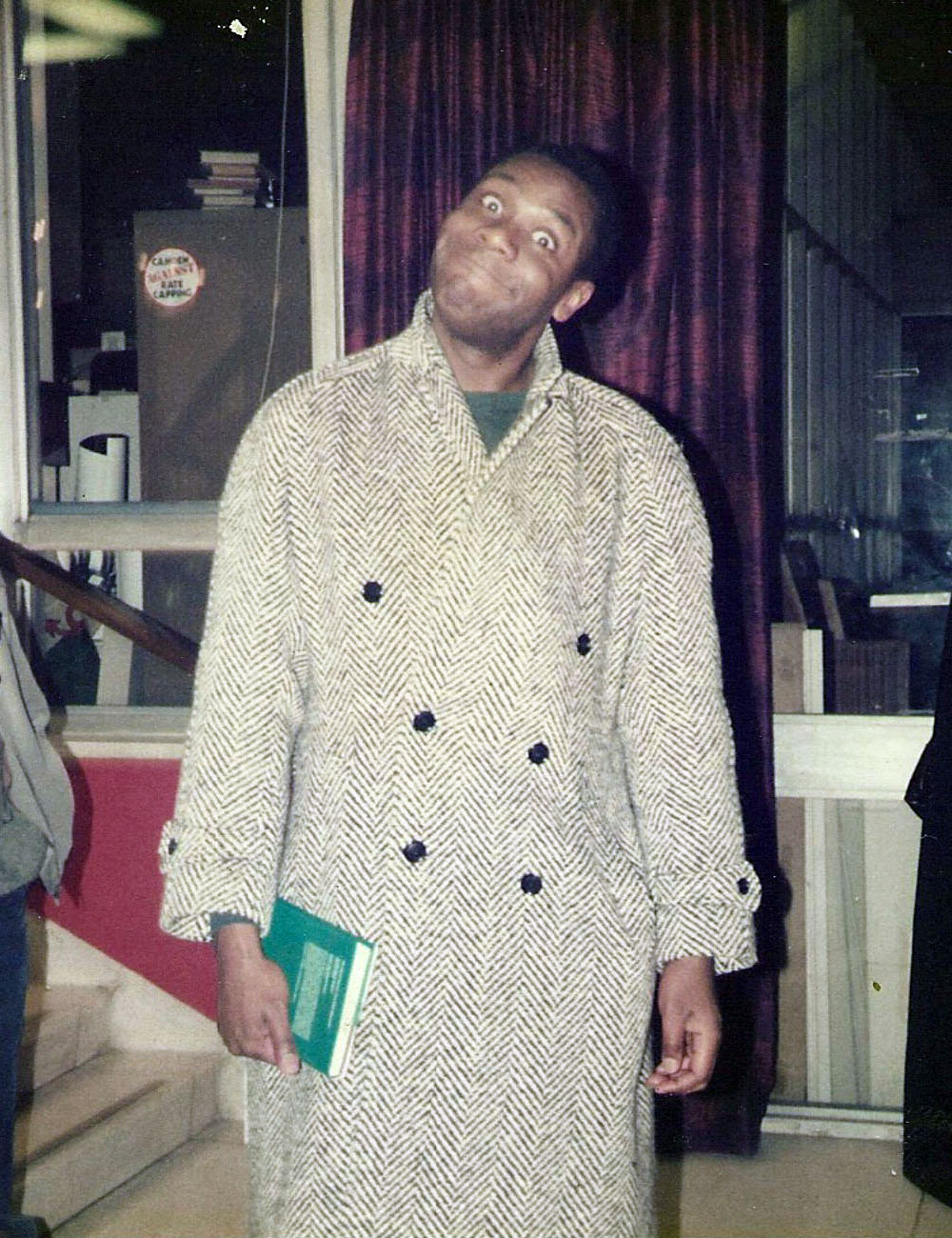 Lenny Henry